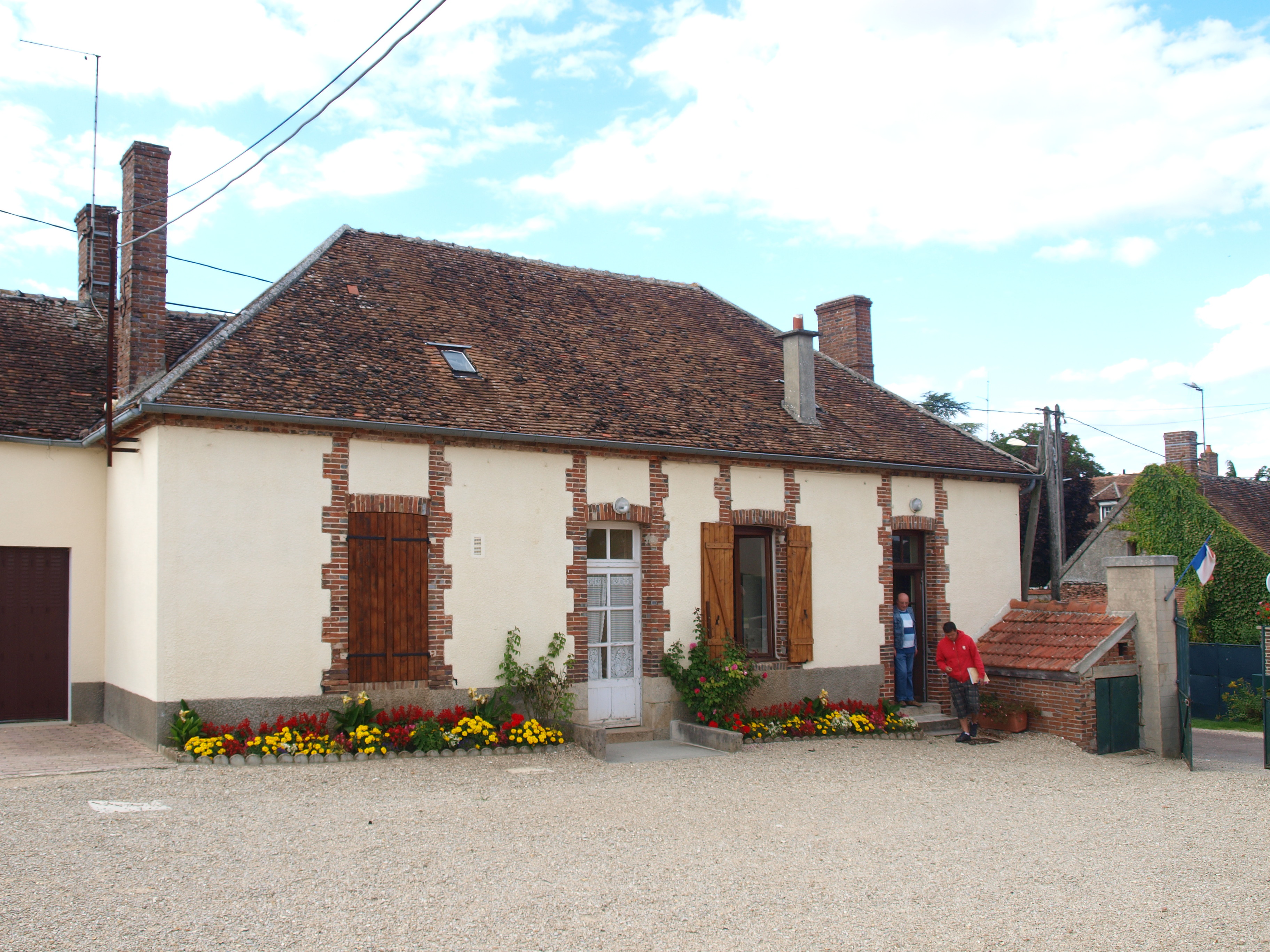 La Louptière-Thénard (Aube, France) ; mairie